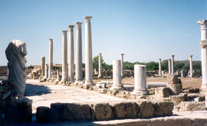 Gimnasio de la ciudad de Salamina de Chipre